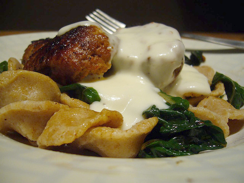 Ein Bild eines Gerichtes mit Sauce Mornay.